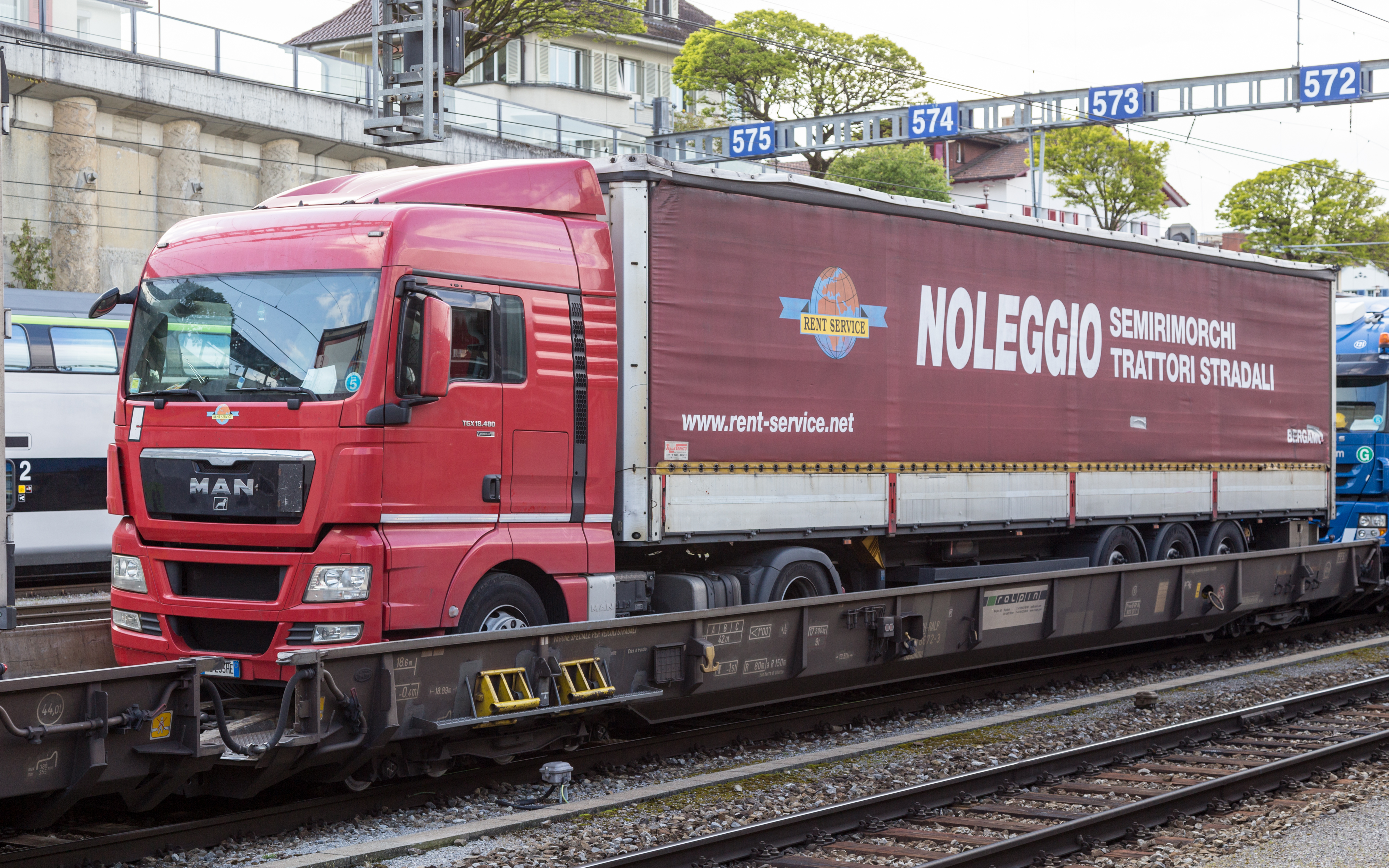 MAN-LKW auf Niederflurwaggon der "Rollenden Landstrasse" nach Italien